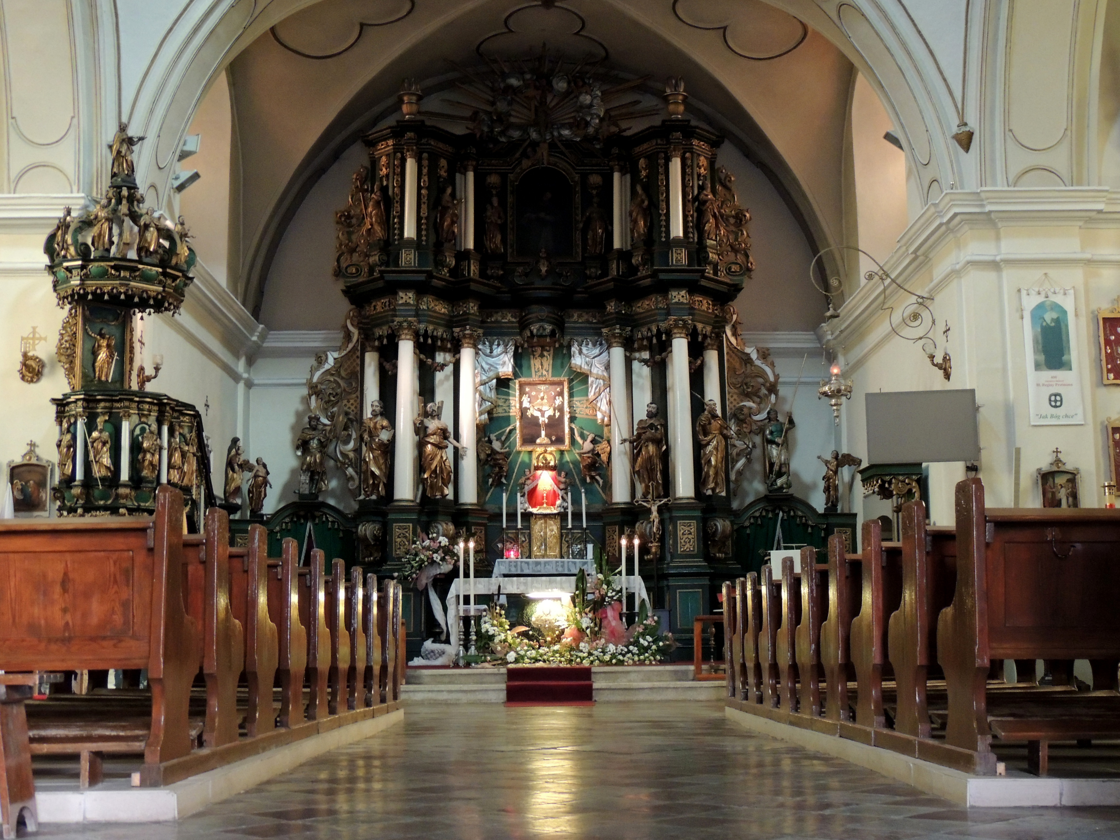 Braniewo, kościół klasztorny jezuitów, ob. par. p.w. Św. Krzyża, 1723-1731